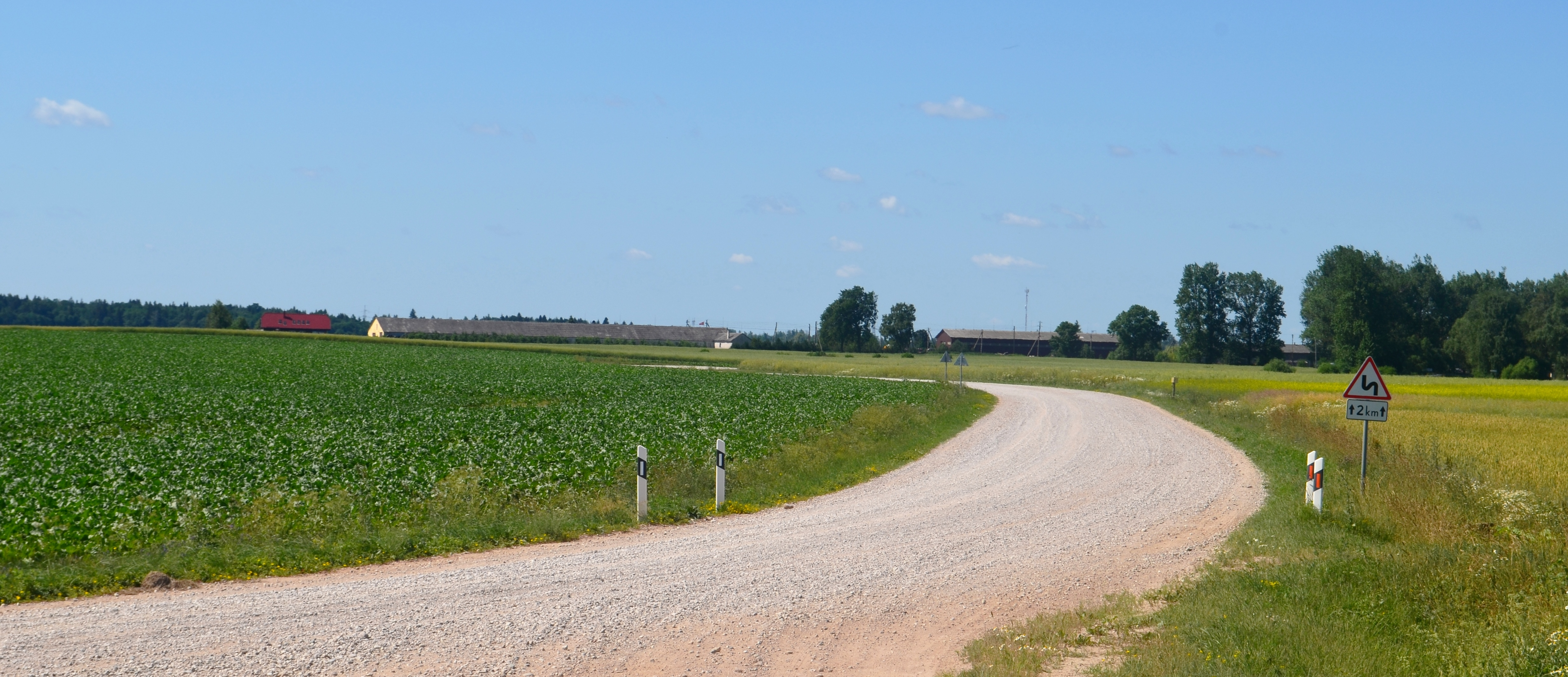 Antagynė, Kauno raj.